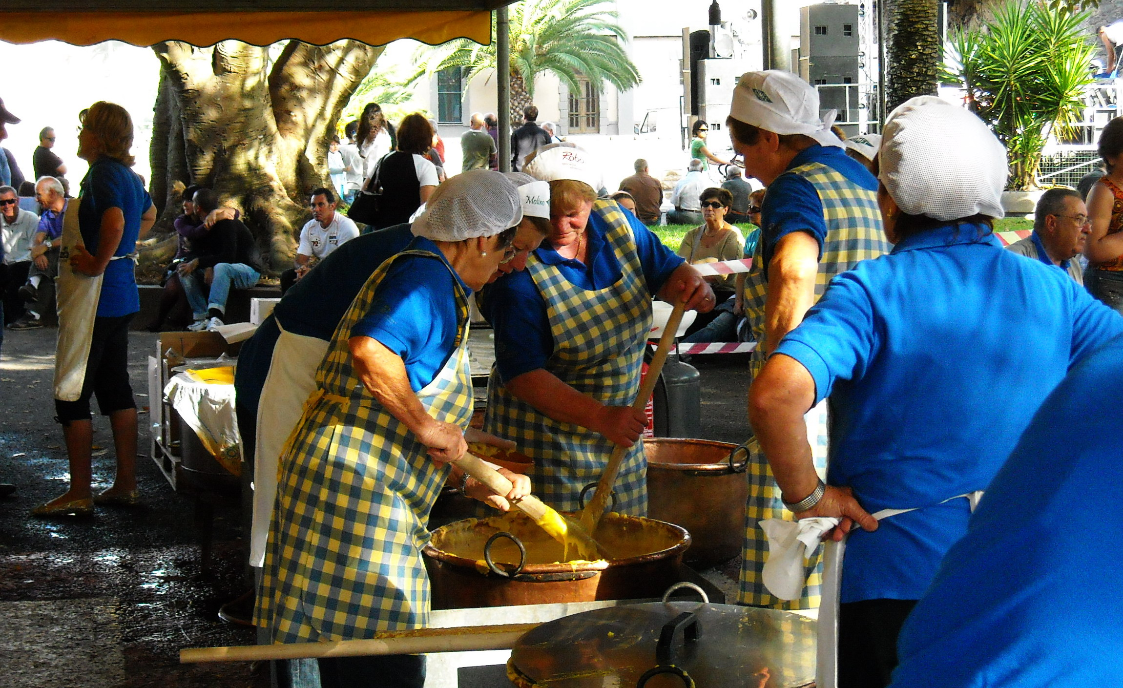 Sagra della Polenta ad Arborea (provincia di Oristano)